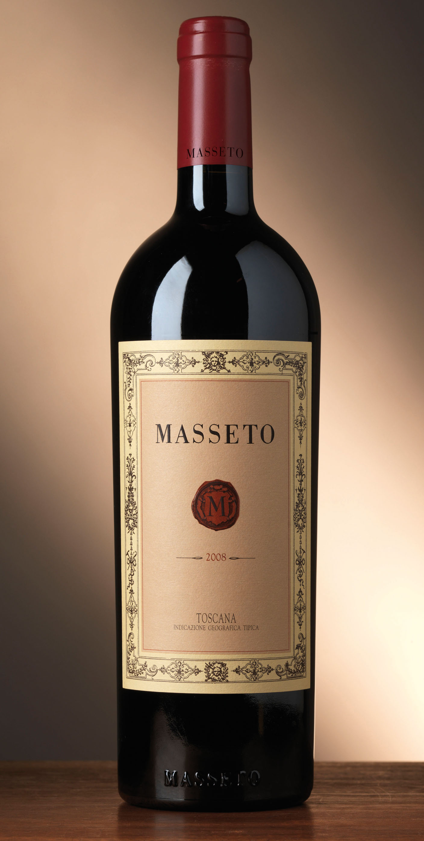 Bottiglia di vino